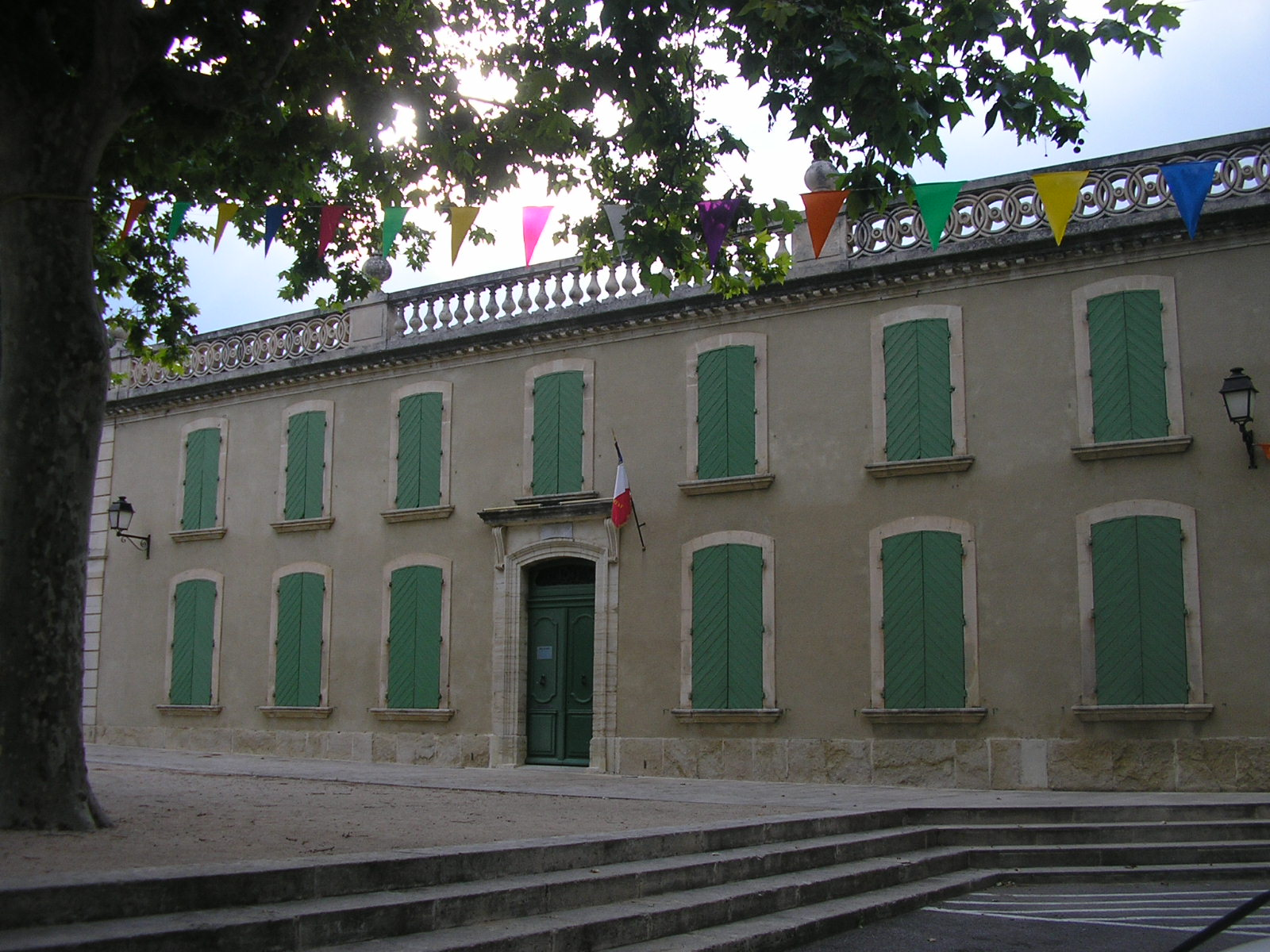 Hôtel de ville de Loriol